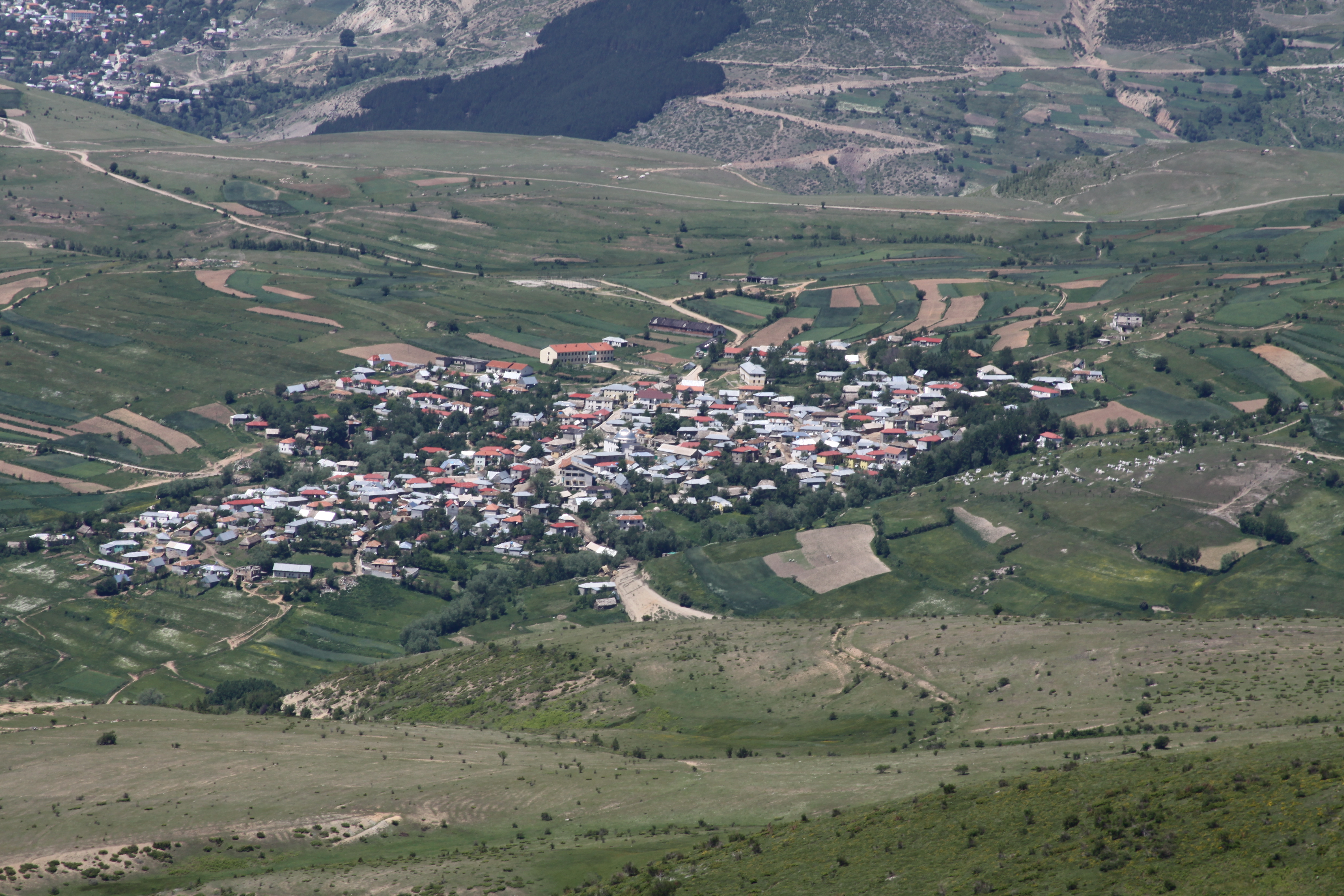 Ky eshte fshati i Shishtavecit, rrethi Kukes qe banohet kryesisht nga Gorane.